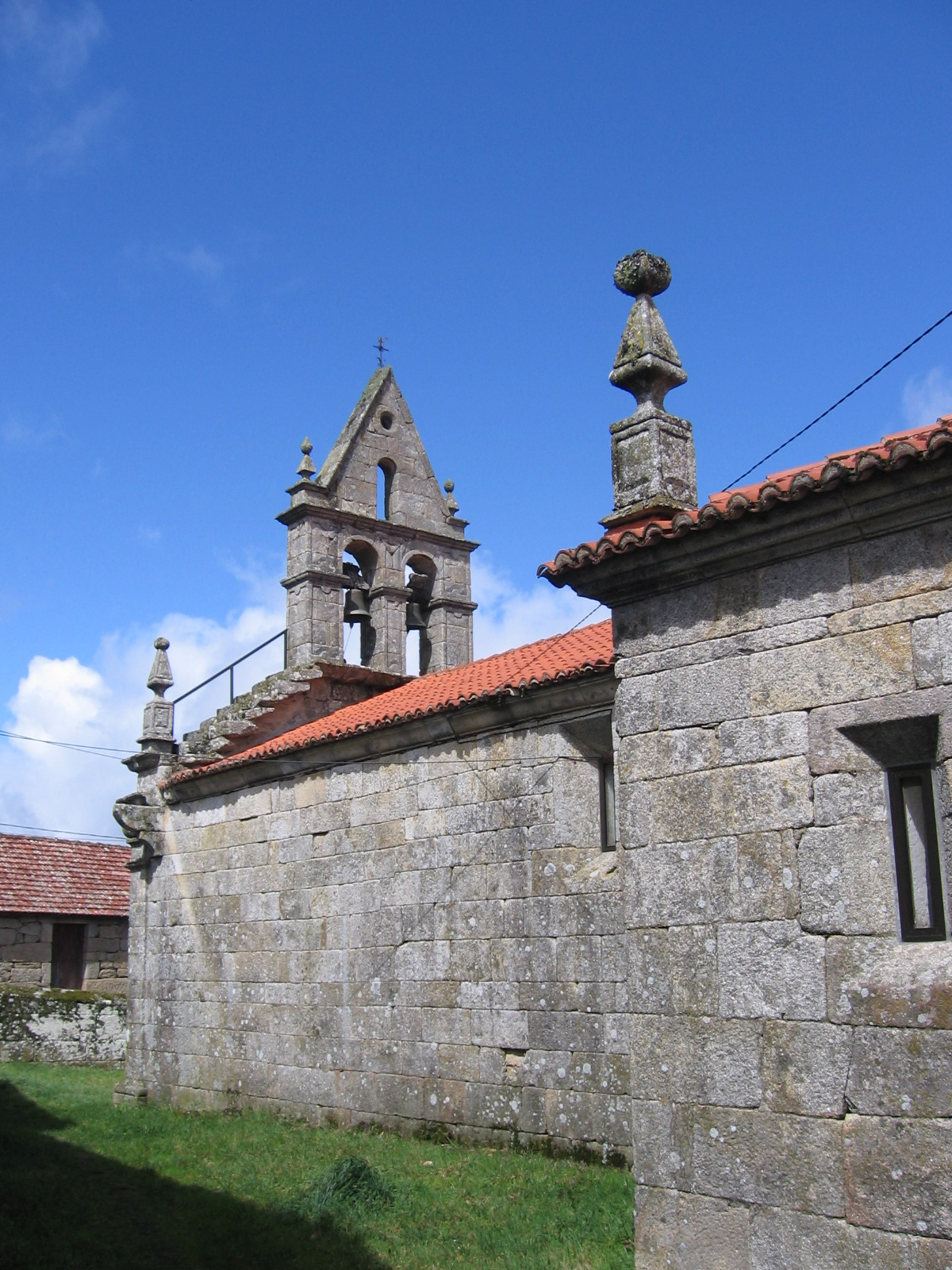 Igreja, Santiago de Rubiás, Calvos de Randín, Galiza